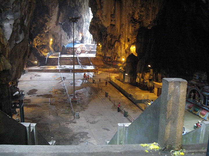 Batu Caves